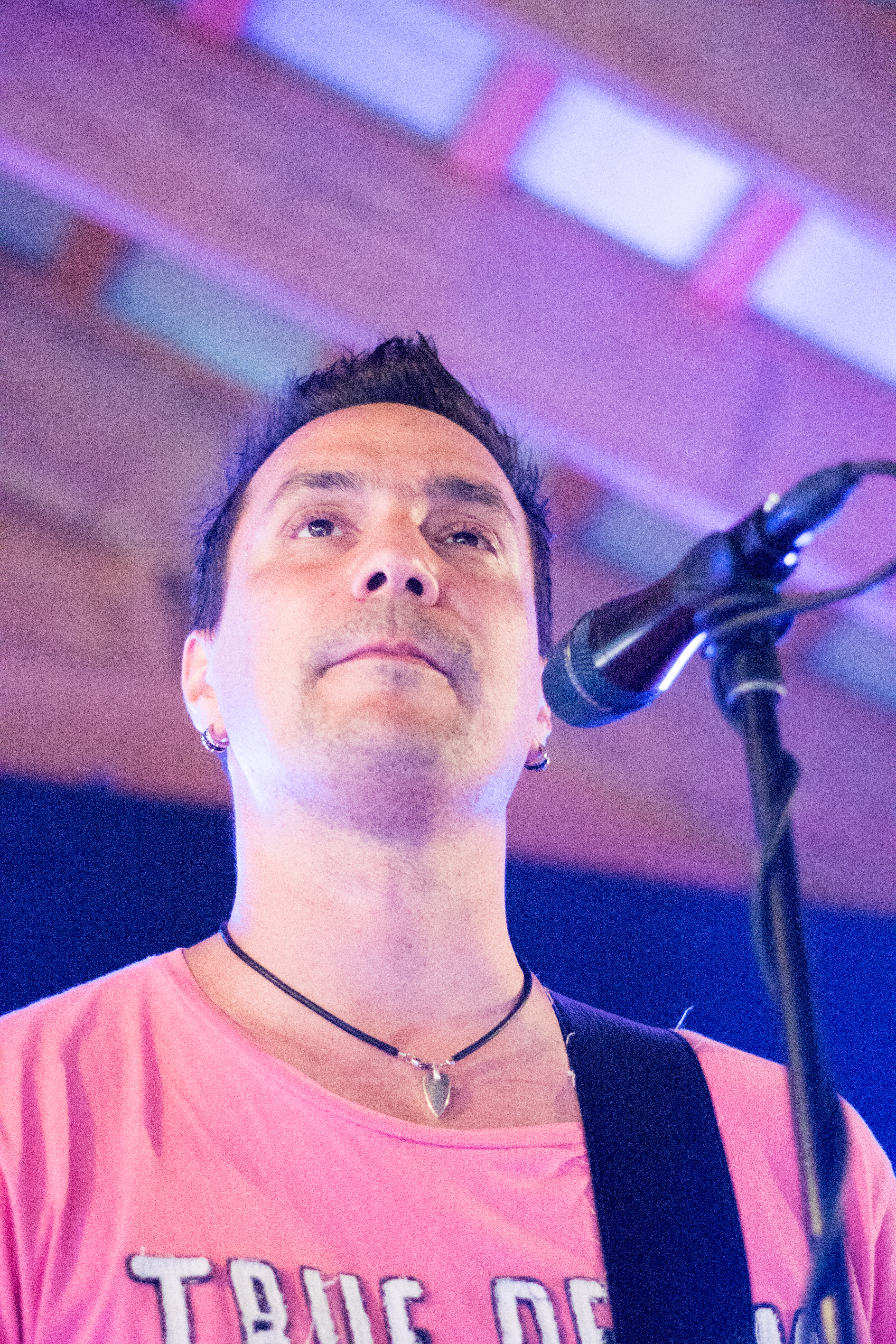 Janne Raappana suomalainen laulaja